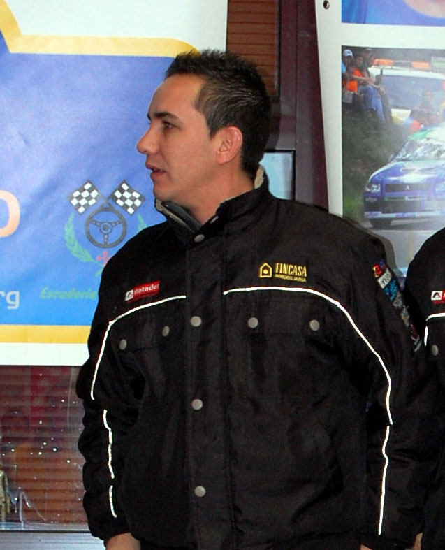 Alberto Meira.